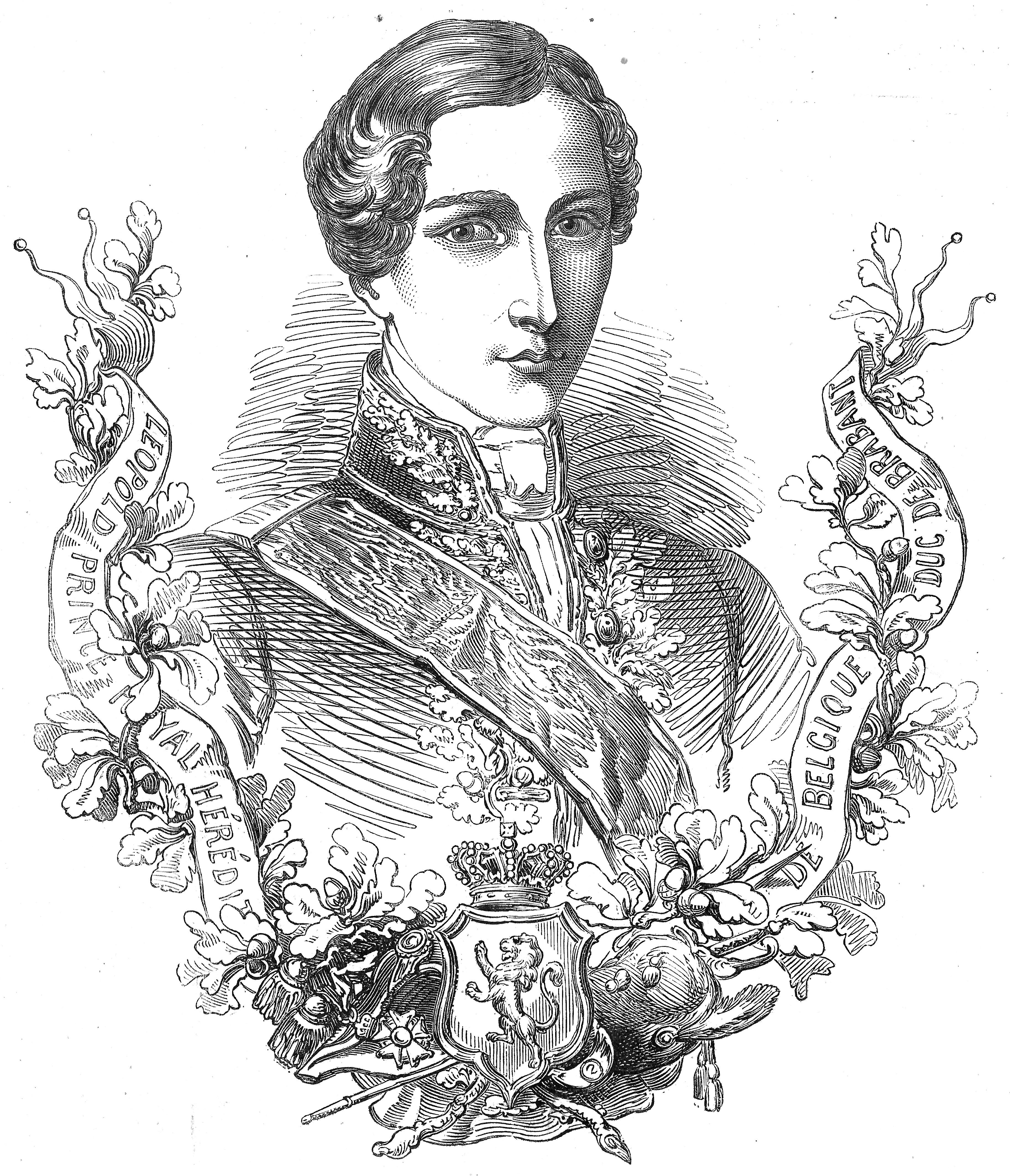 S.A.R. le prince Léopold de Belgique, duc de Brabant, futur roi Léopold II de Belgique.